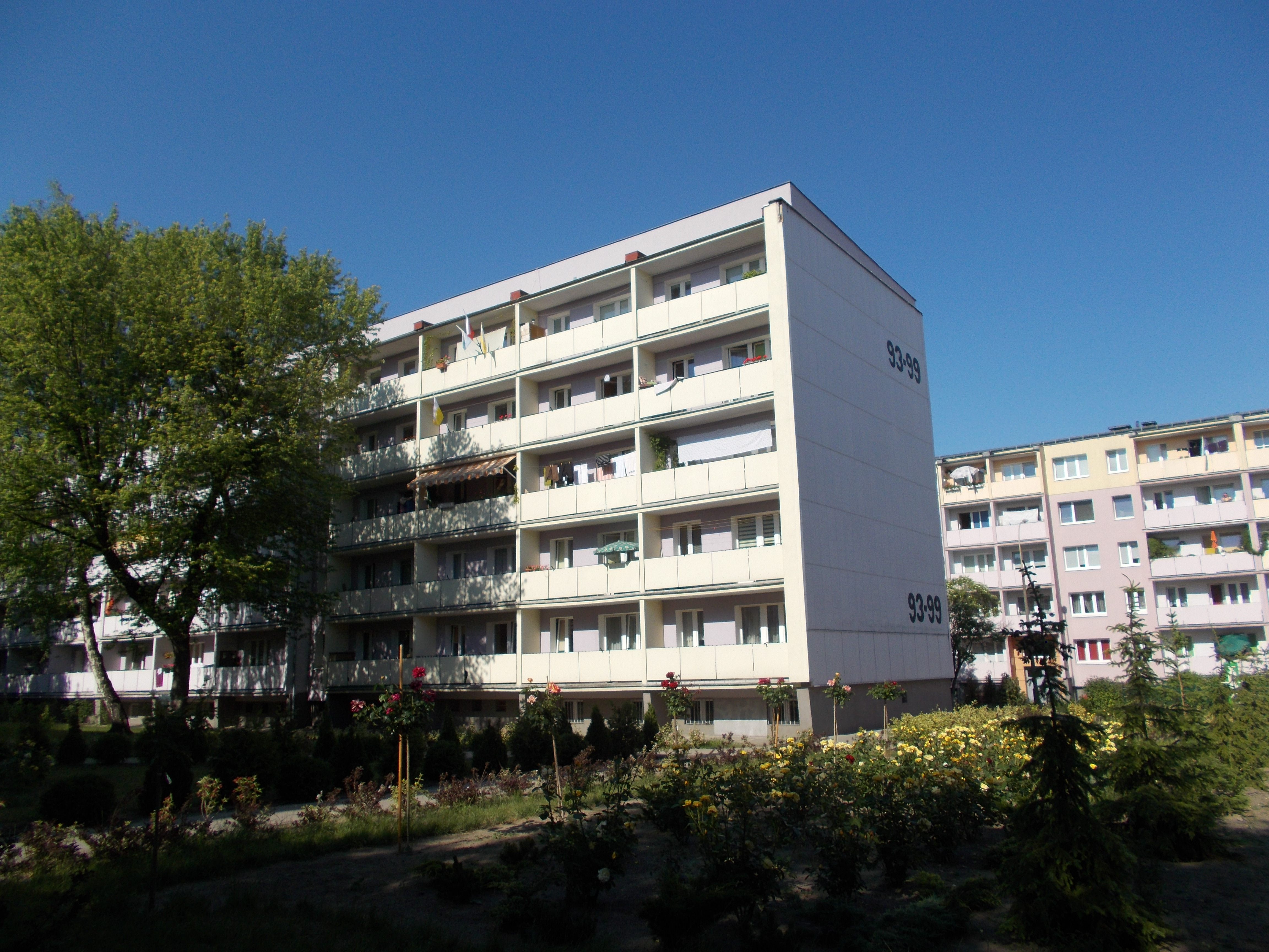 Osiedle Rzeczypospolitej w Poznaniu.